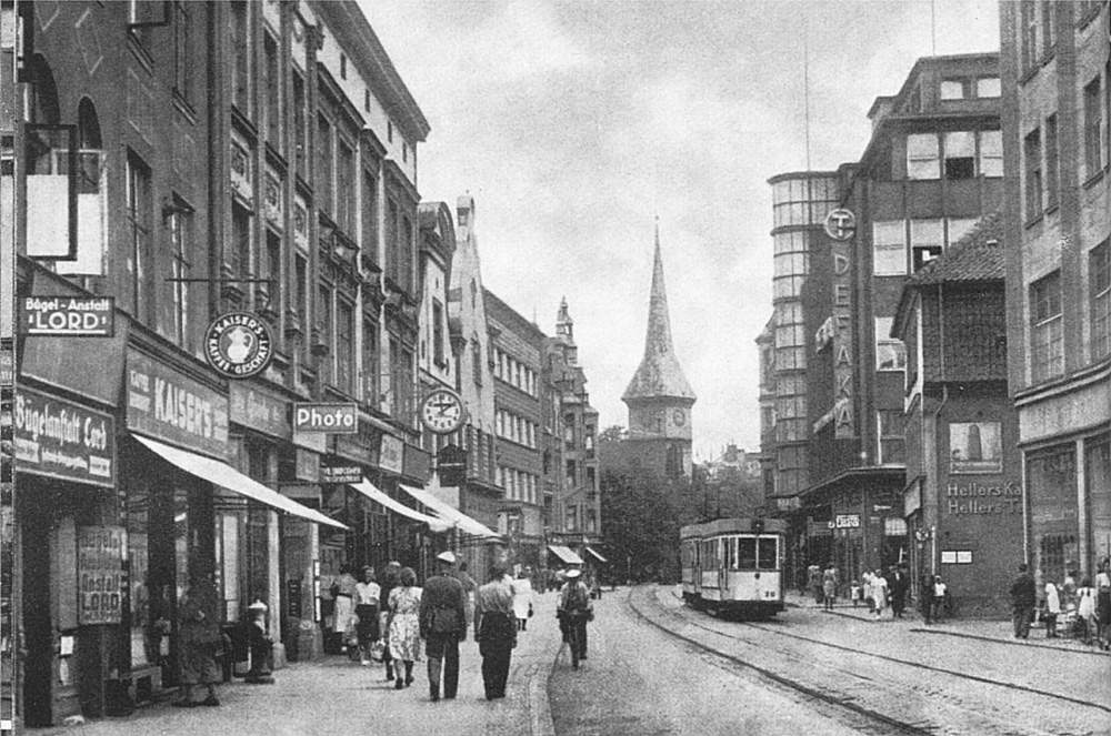 Достопримечательности города Кёнигсберг (Калининградская область РФ)